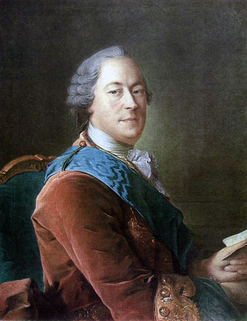 Антропов Алексей Петрович : Портрет князя М.И.Воронцова